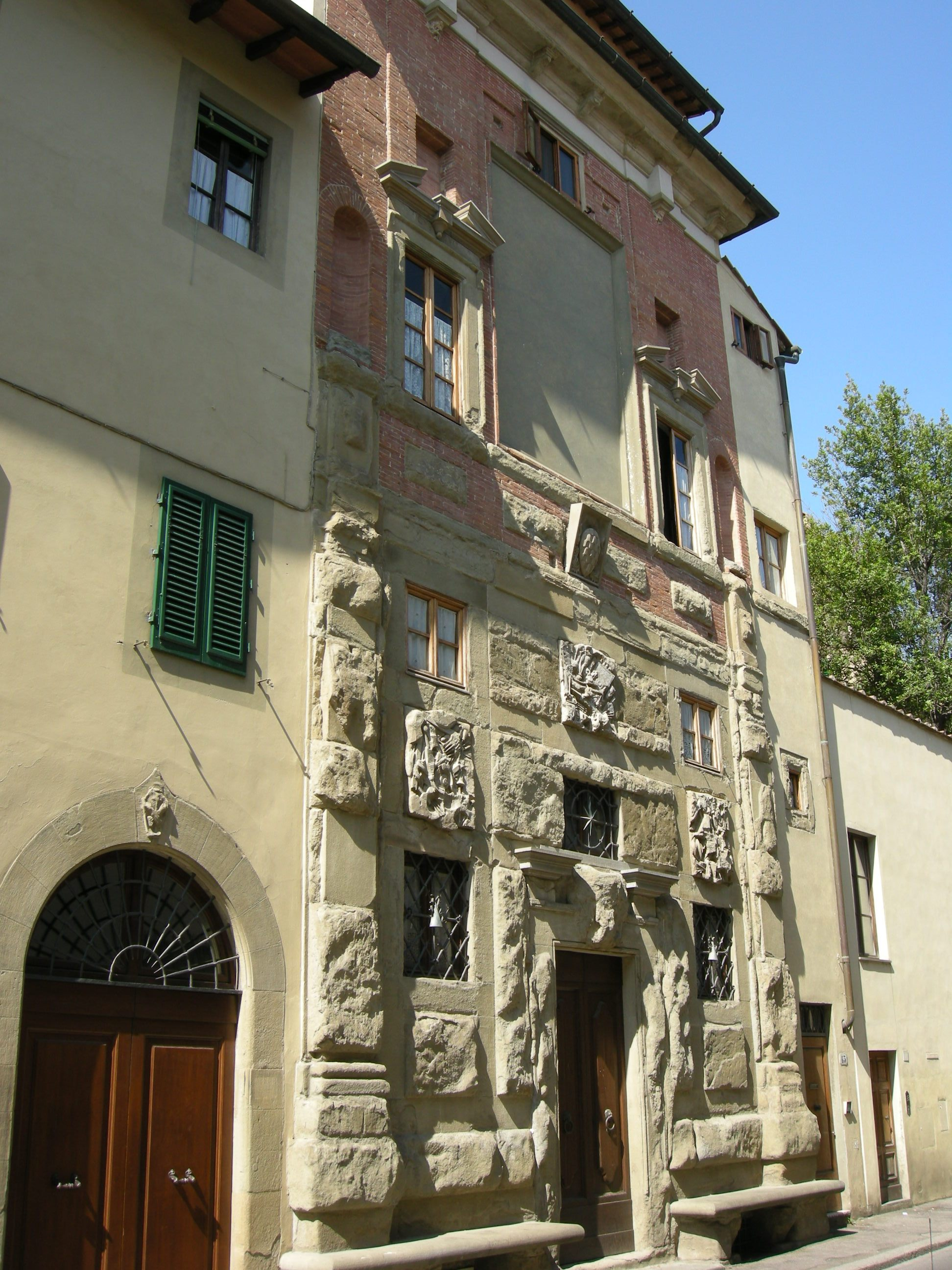 Palazzetto zuccari